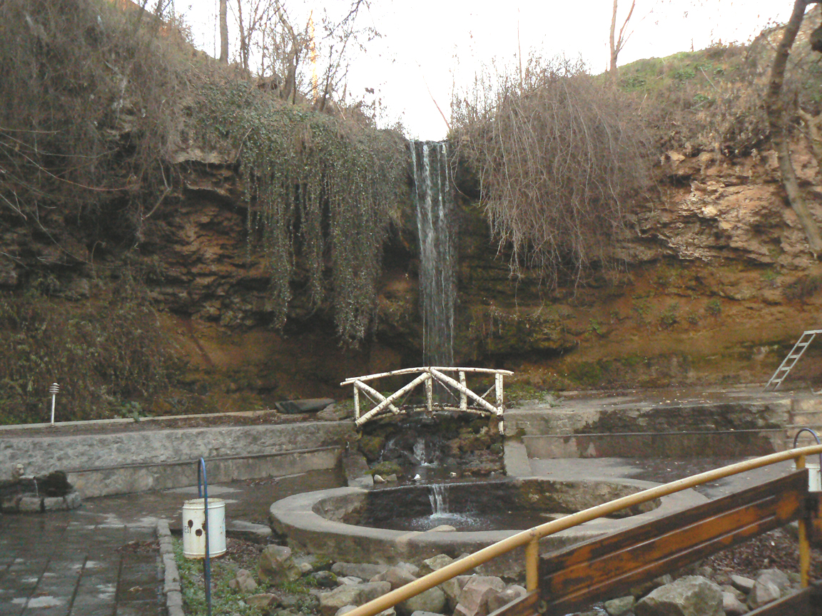 Водопад Бучалото в град Радомир, България. Buchaloto Waterfall, in the town of Radomir, Bulgaria.